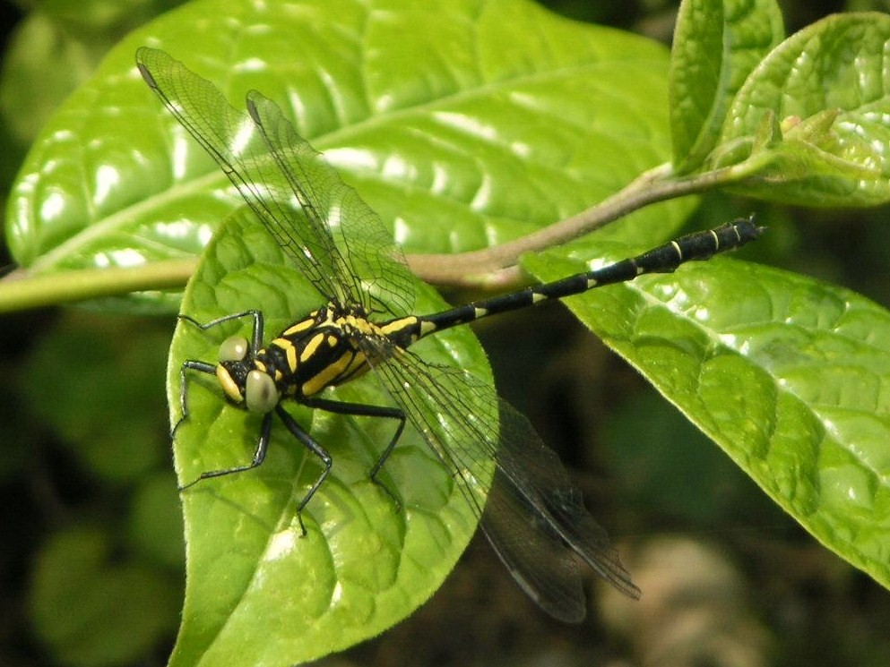 Davidius nanus1